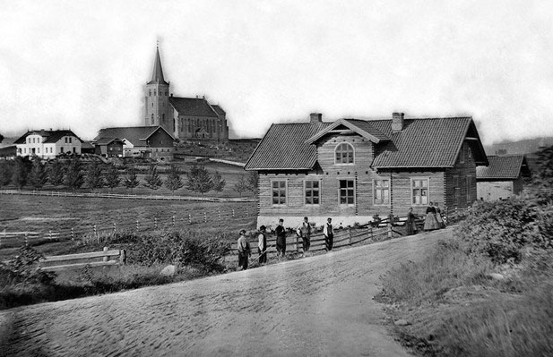 Østre Aker kirke, prestegård, klokkergård, Ulven skole, hage, mennesker, kulturlandskap.